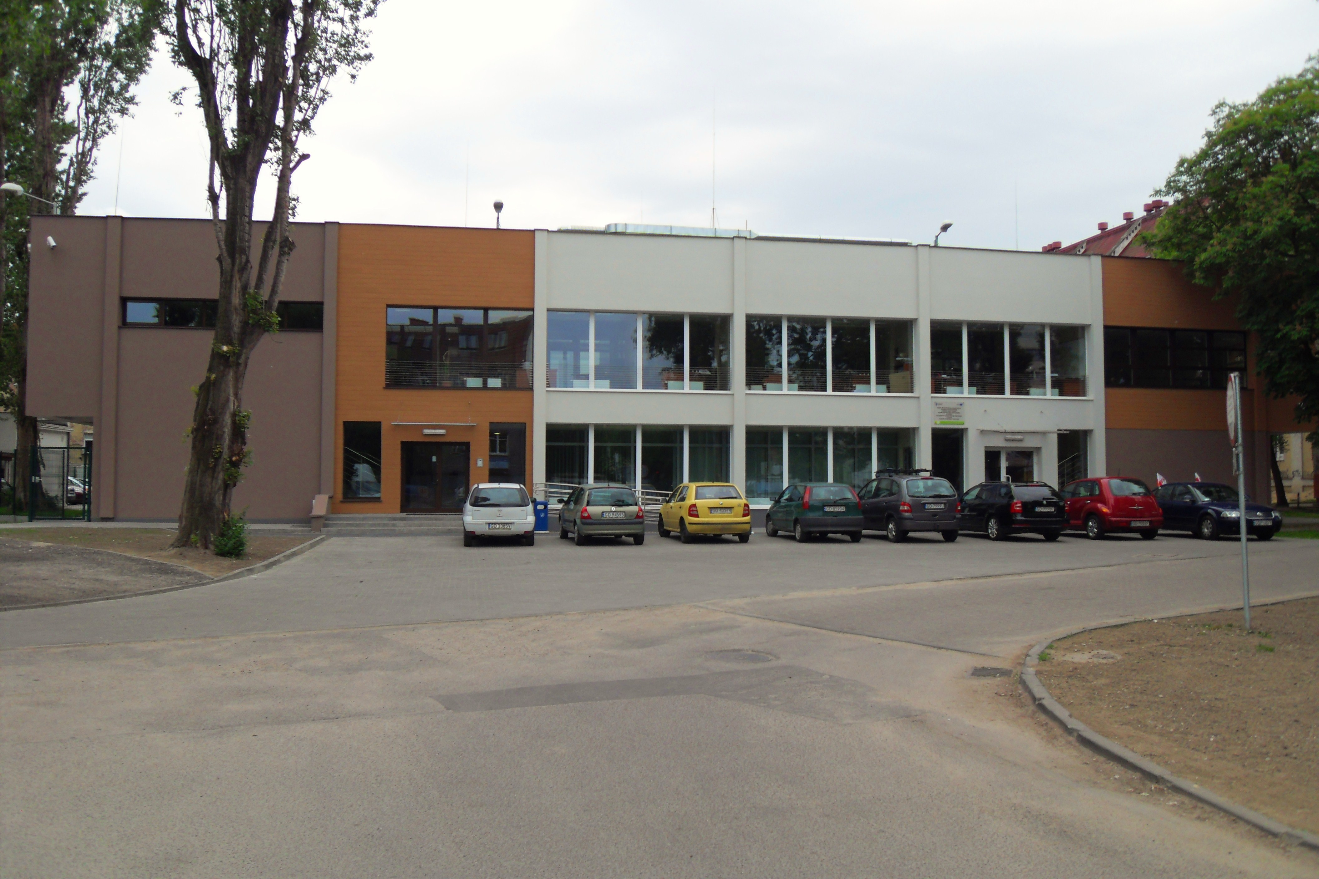 Gdańsk Wrzeszcz, ul. Wyspiańskiego 9A.